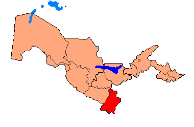 Uzbekistan - Surxondaryo Province